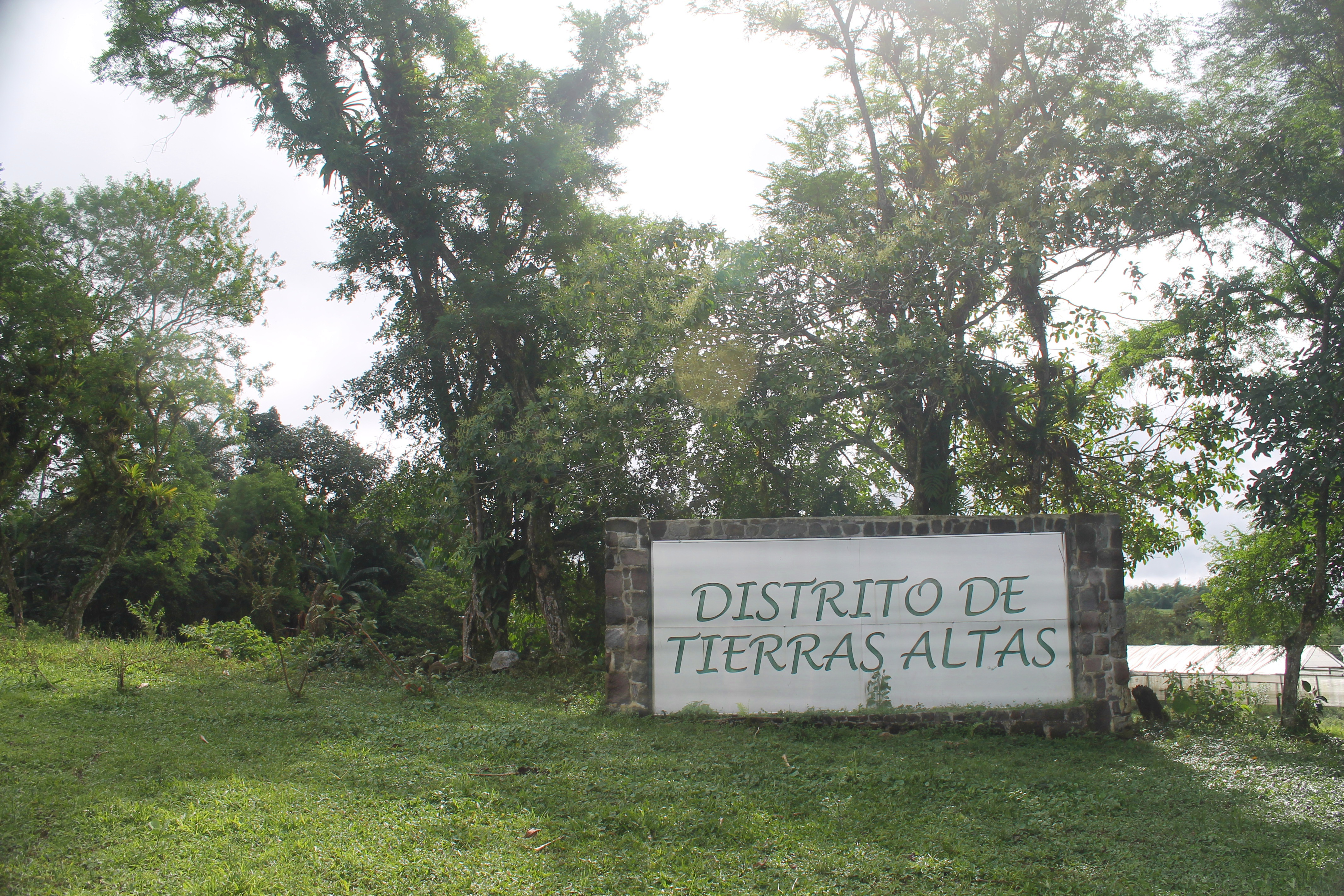 Letrero en la entrada del Distrito de Tierras Altas, Chiriquí.